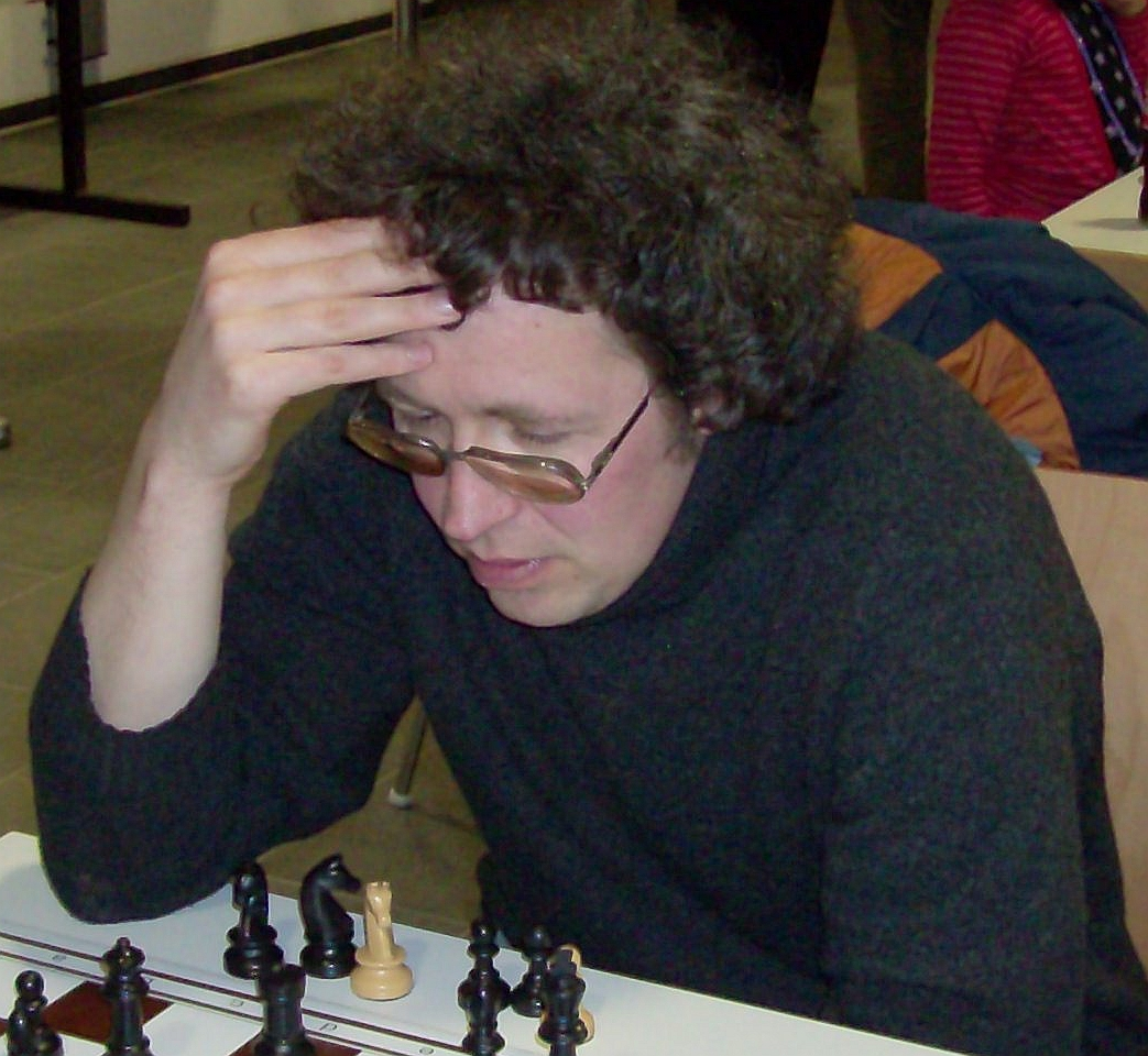 Andrei Sokolov, chess grandmaster